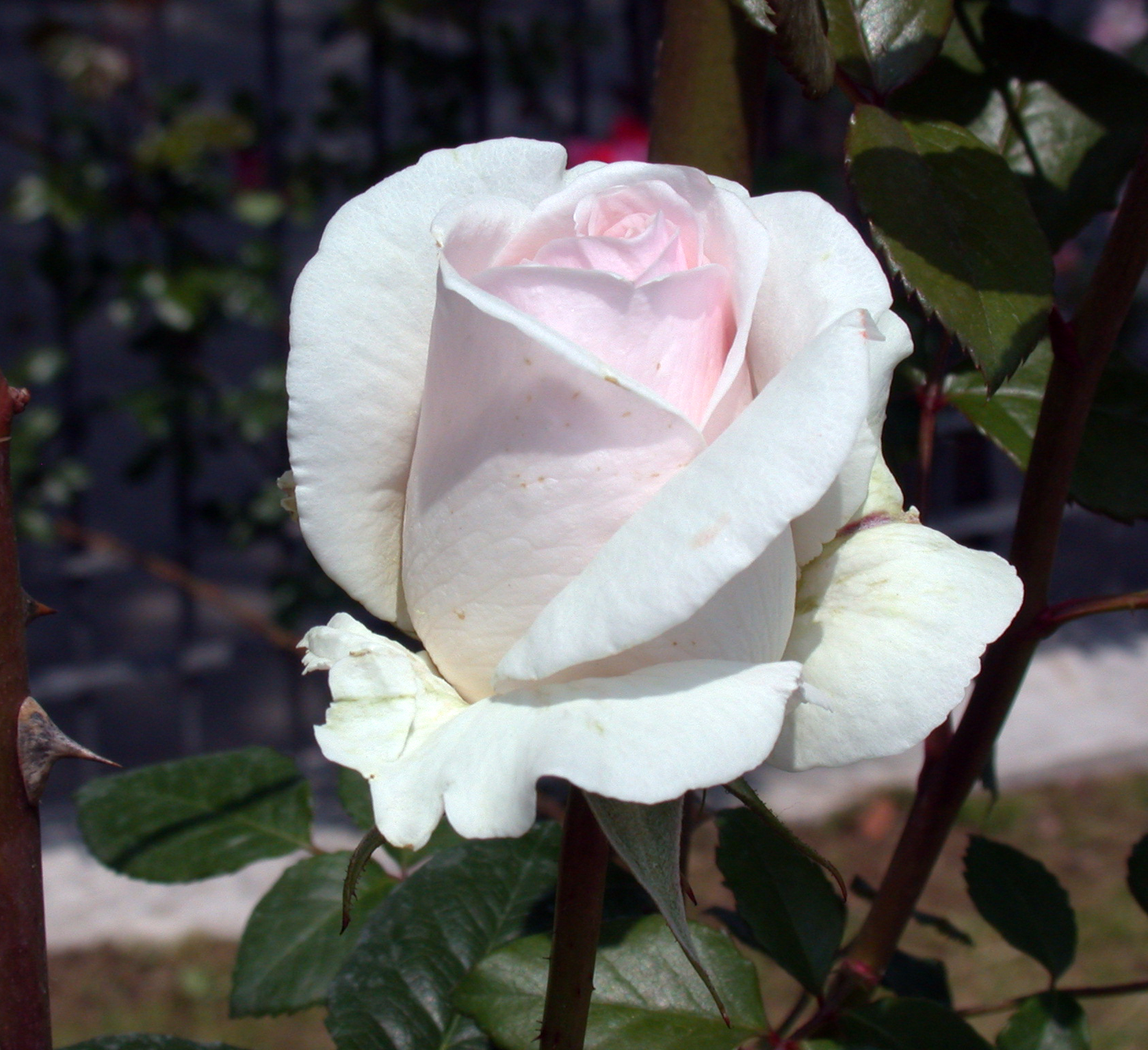 Roma, Roseto comunale, Rosa Julia Renaissance, Poulsen 1996 (Danimarca) T5 ARB (6-05-2006)